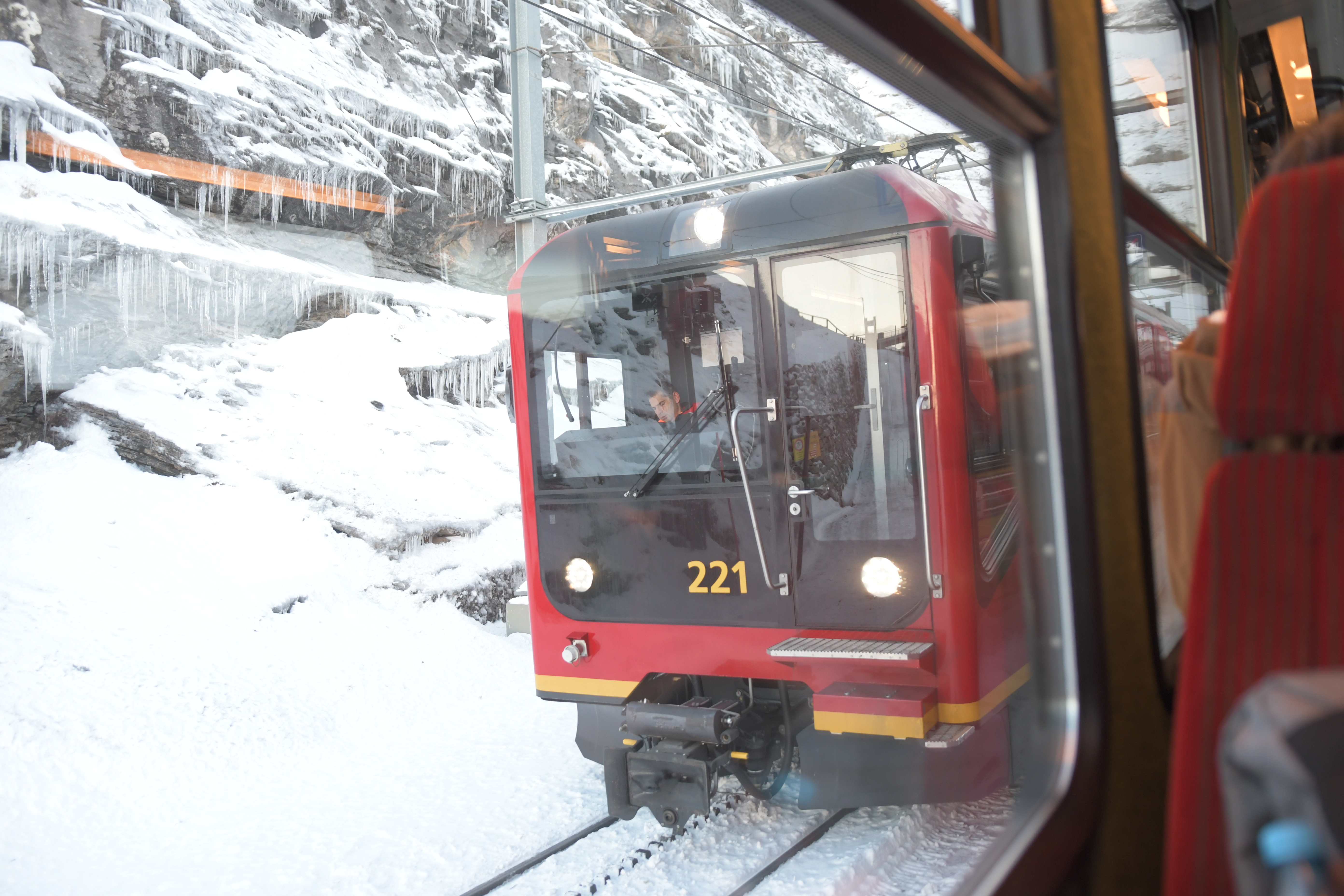 少女峰鐵路的Bhe 4/8列車，編號221